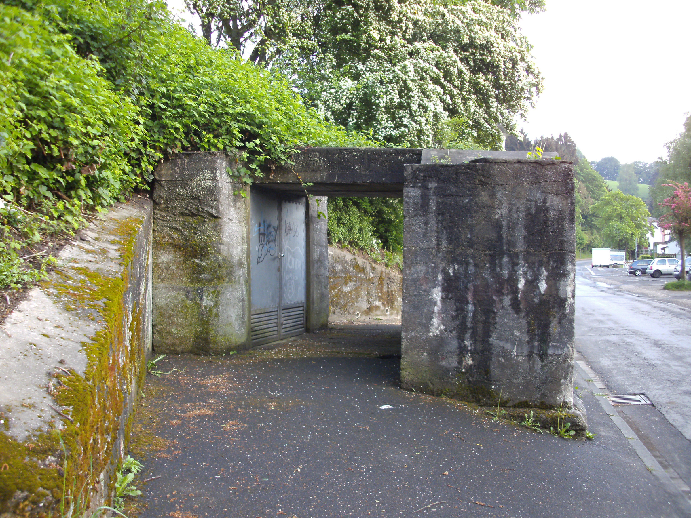 Bunker Hoffnungsthal Eingang